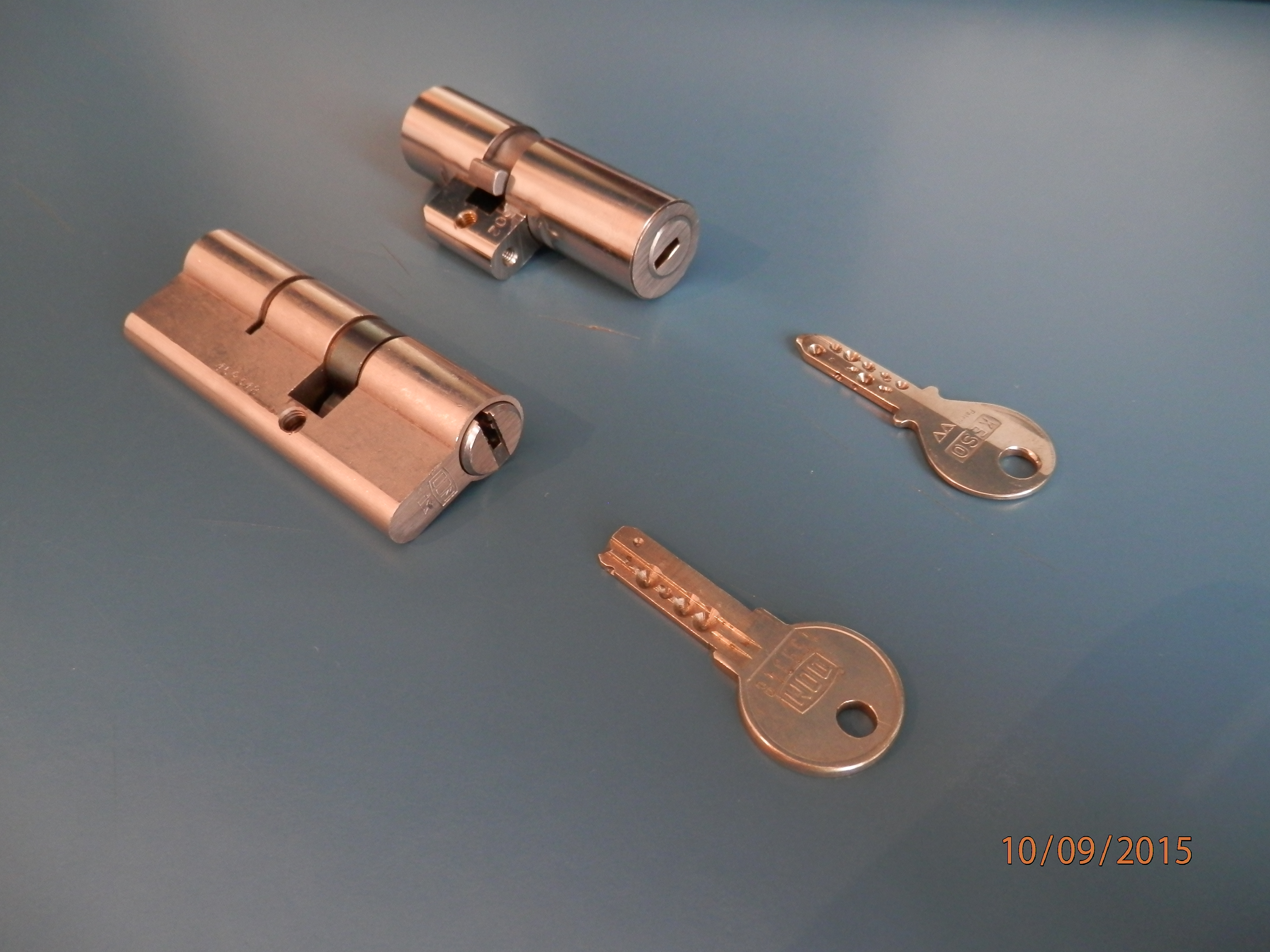 Cilindri a profilo europeo e svizzero e rispettive chiavi